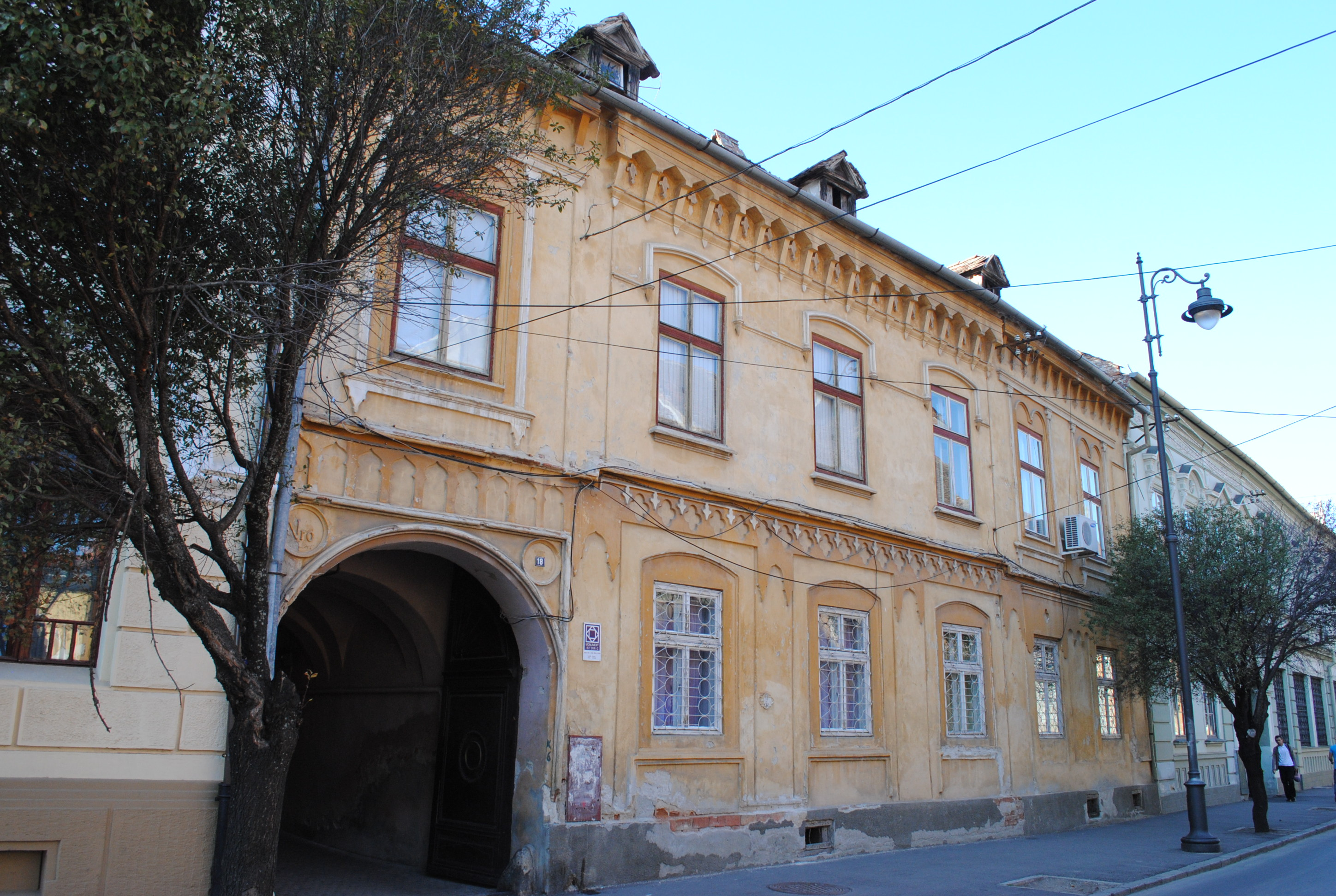 Casă, sec. XV - XVI,1639, 1852